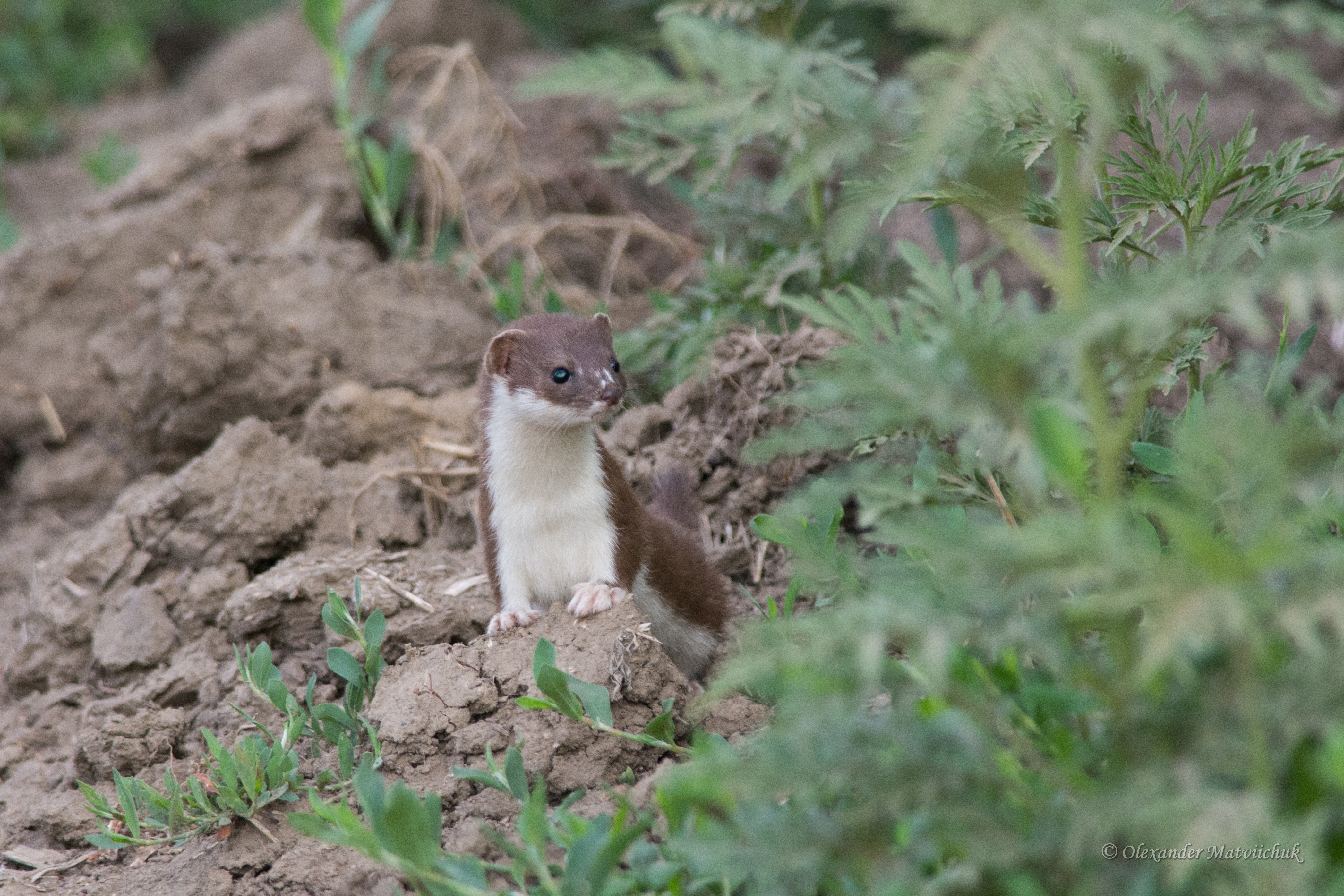 «Кармелюкове Поділля», Чечельницький р-н, Бритавська сільська рада